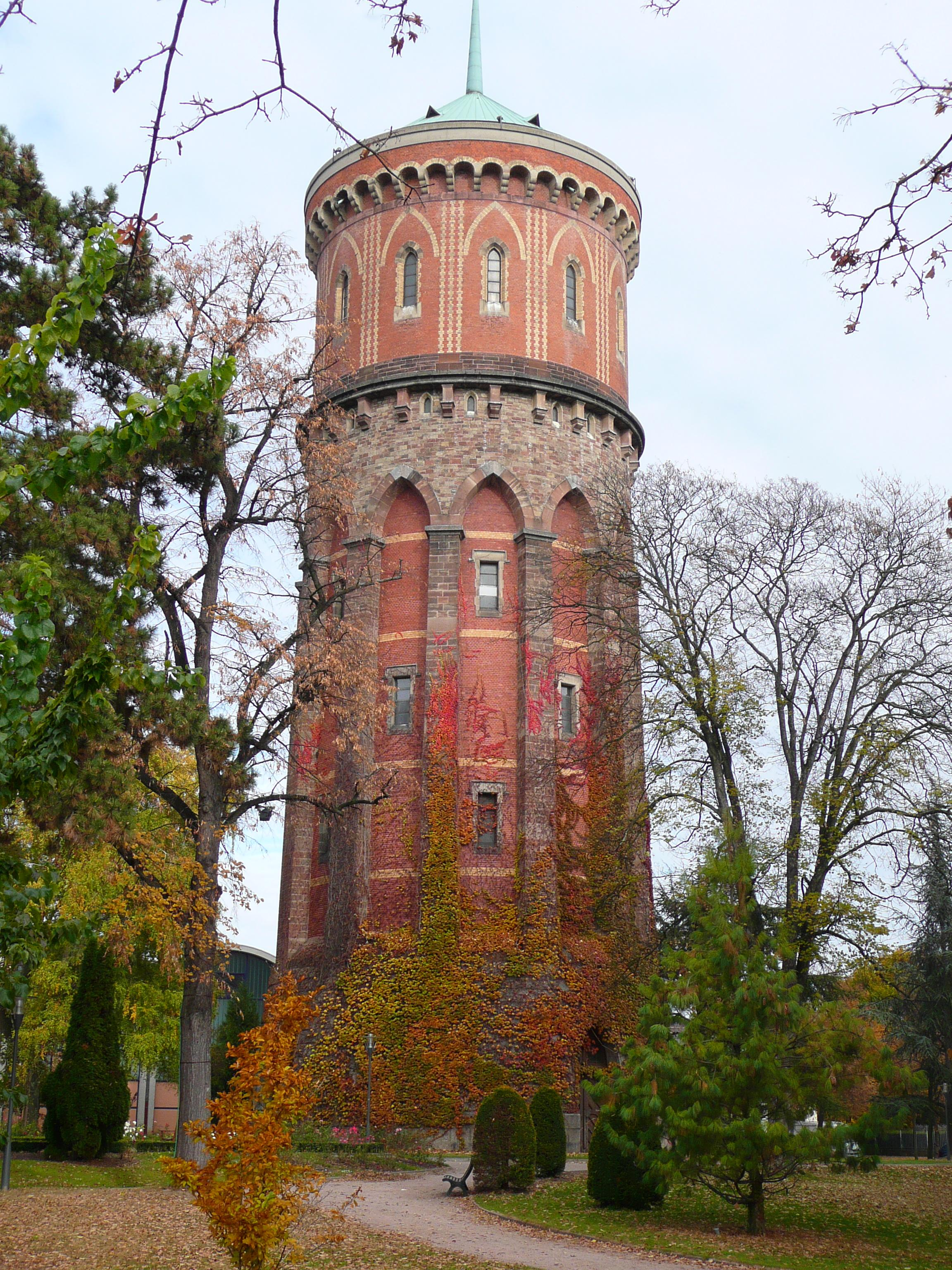 Colmar, France